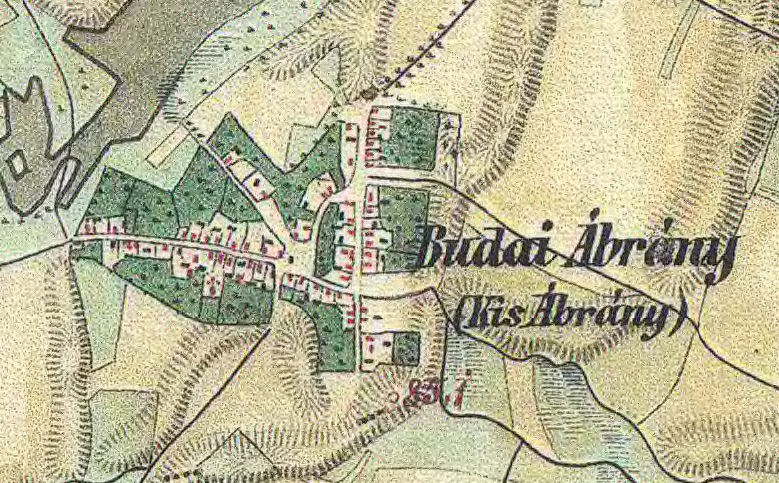 Budai Ábrány (ma Nyírábrány), a második katonai felmérés egyik szelvénye. A térkép felbontása 2,45 méter/pixel, az eredeti méretarány 1:28 800